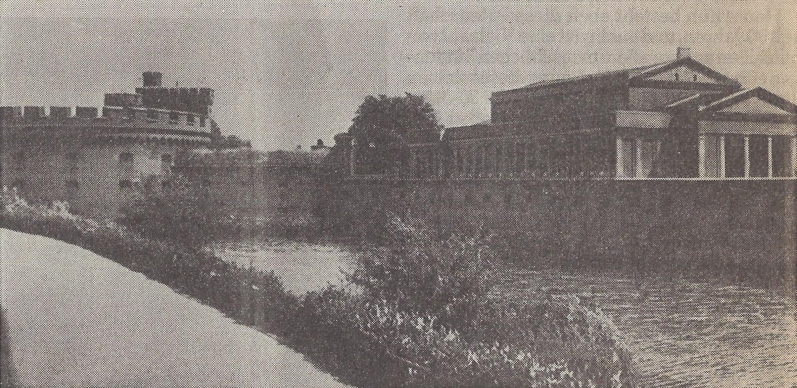 Wrangelturm und Kunsthalle in Königsberg (Preußen).